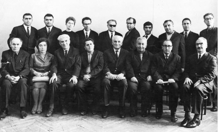 Մի խումբ նշանավոր հայ մաթեմատիկոսների հետ (1975)